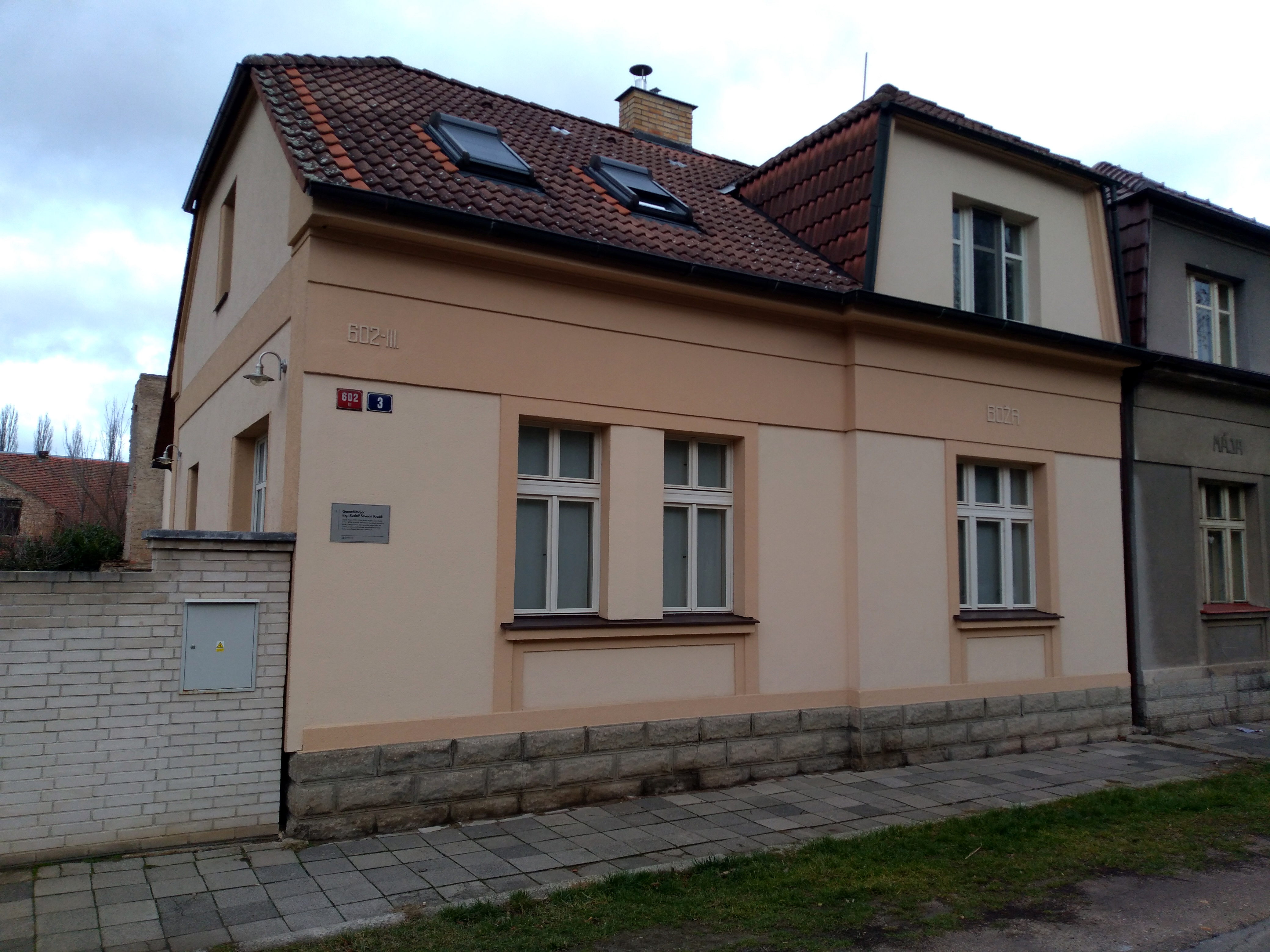 Dům Rudolfa Krzáka v Poděbradech.